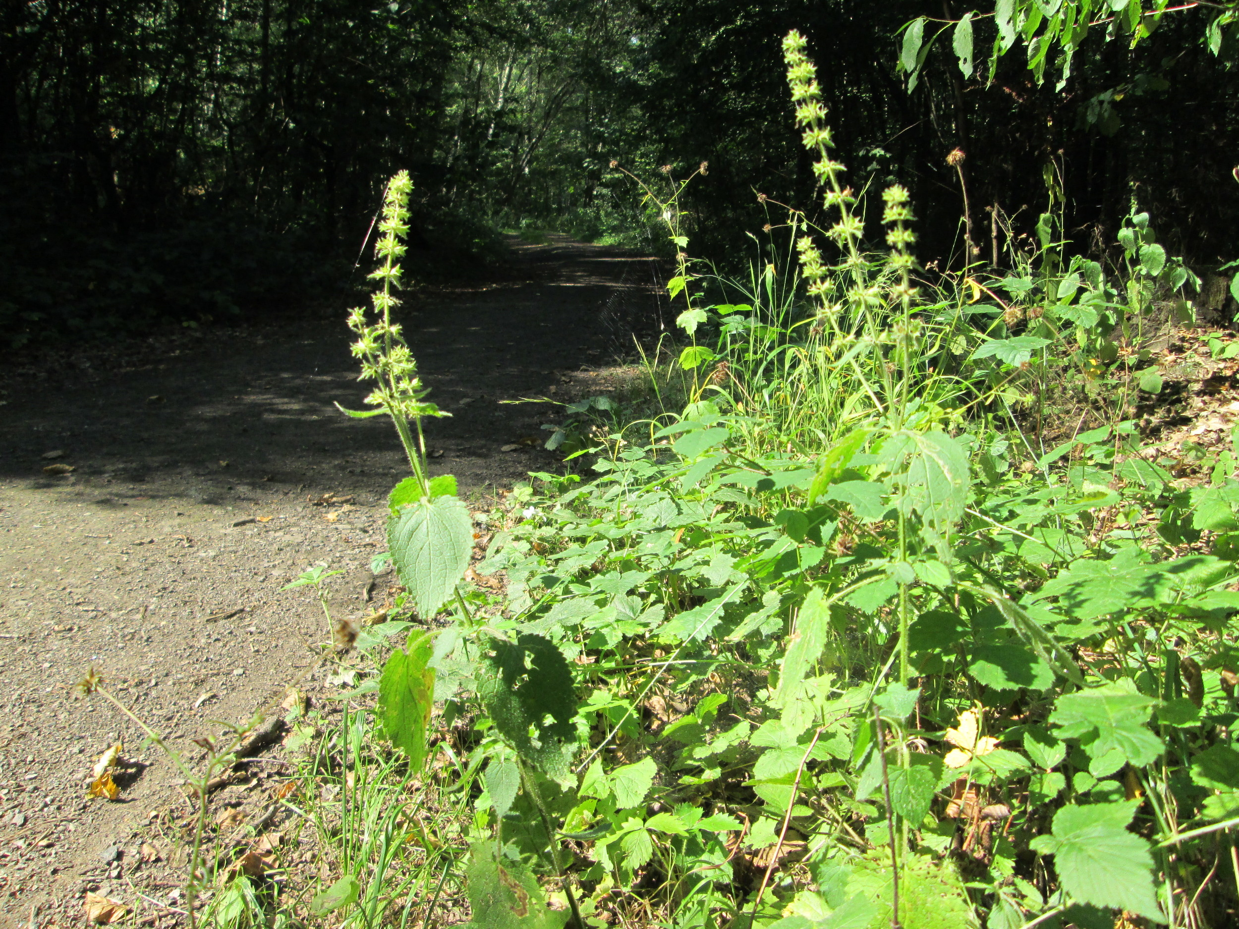 Wald-Ziest (Stachys sylvatica) in einem Waldstück oberhalb von Güdingen